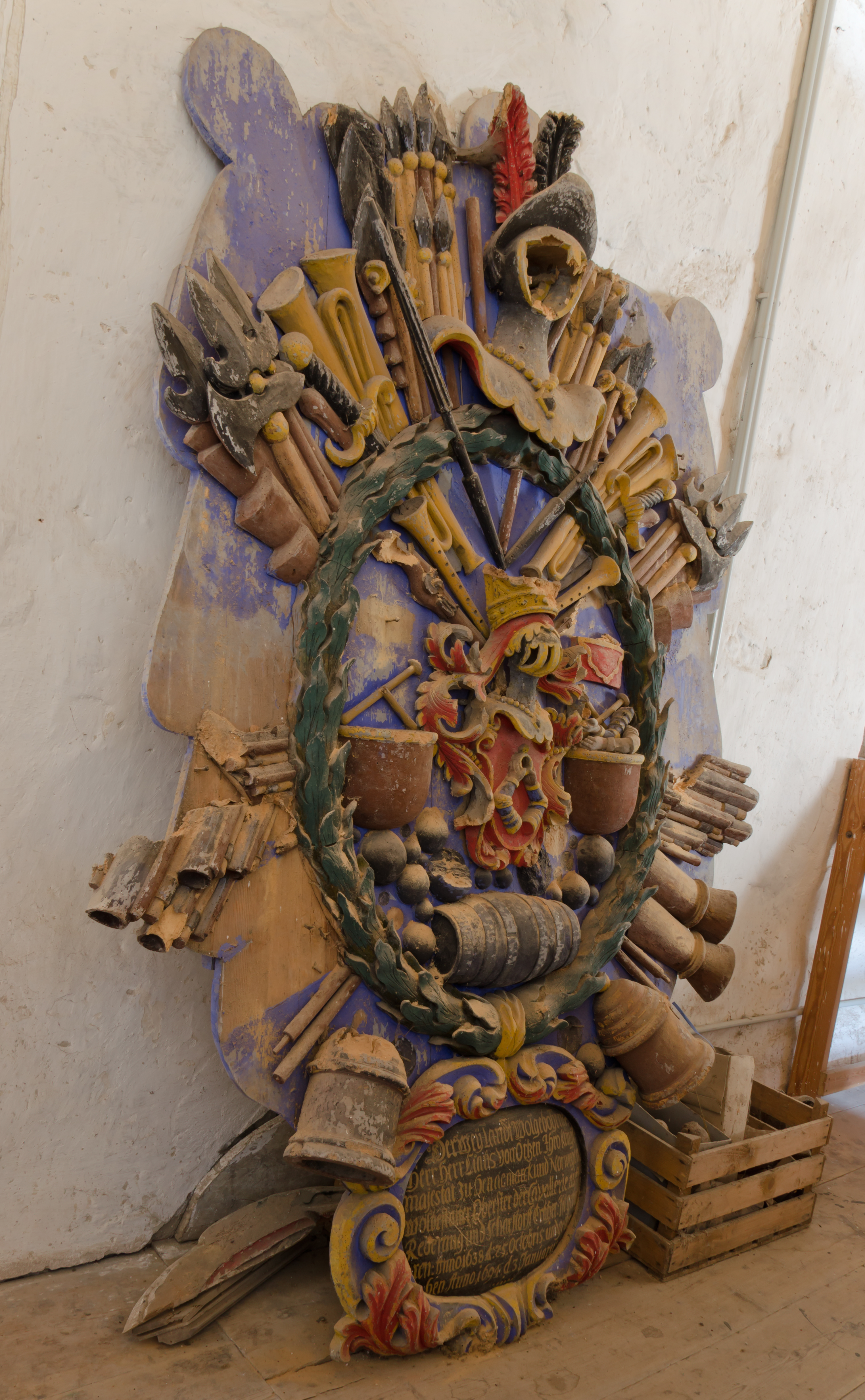 Totenschild des Claus von Örtzen